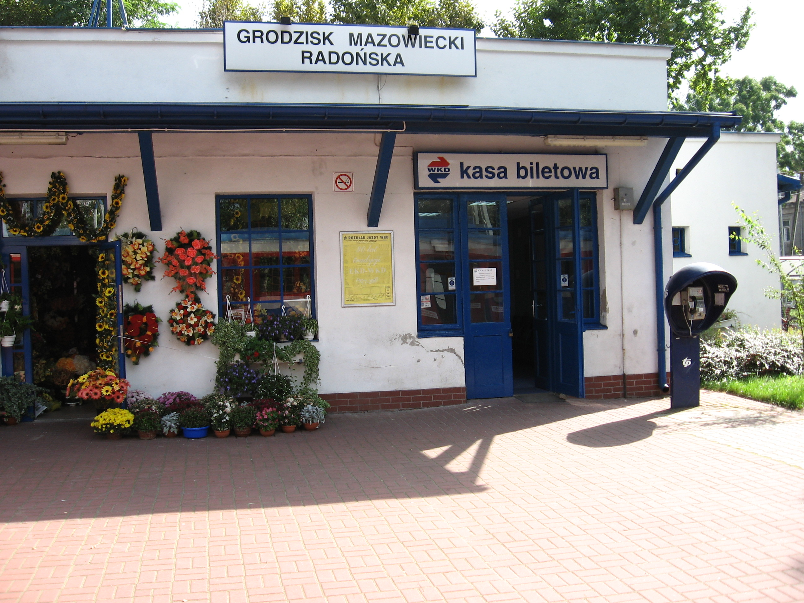 Grodzisk Mazowiecki Radonska commuter rail station